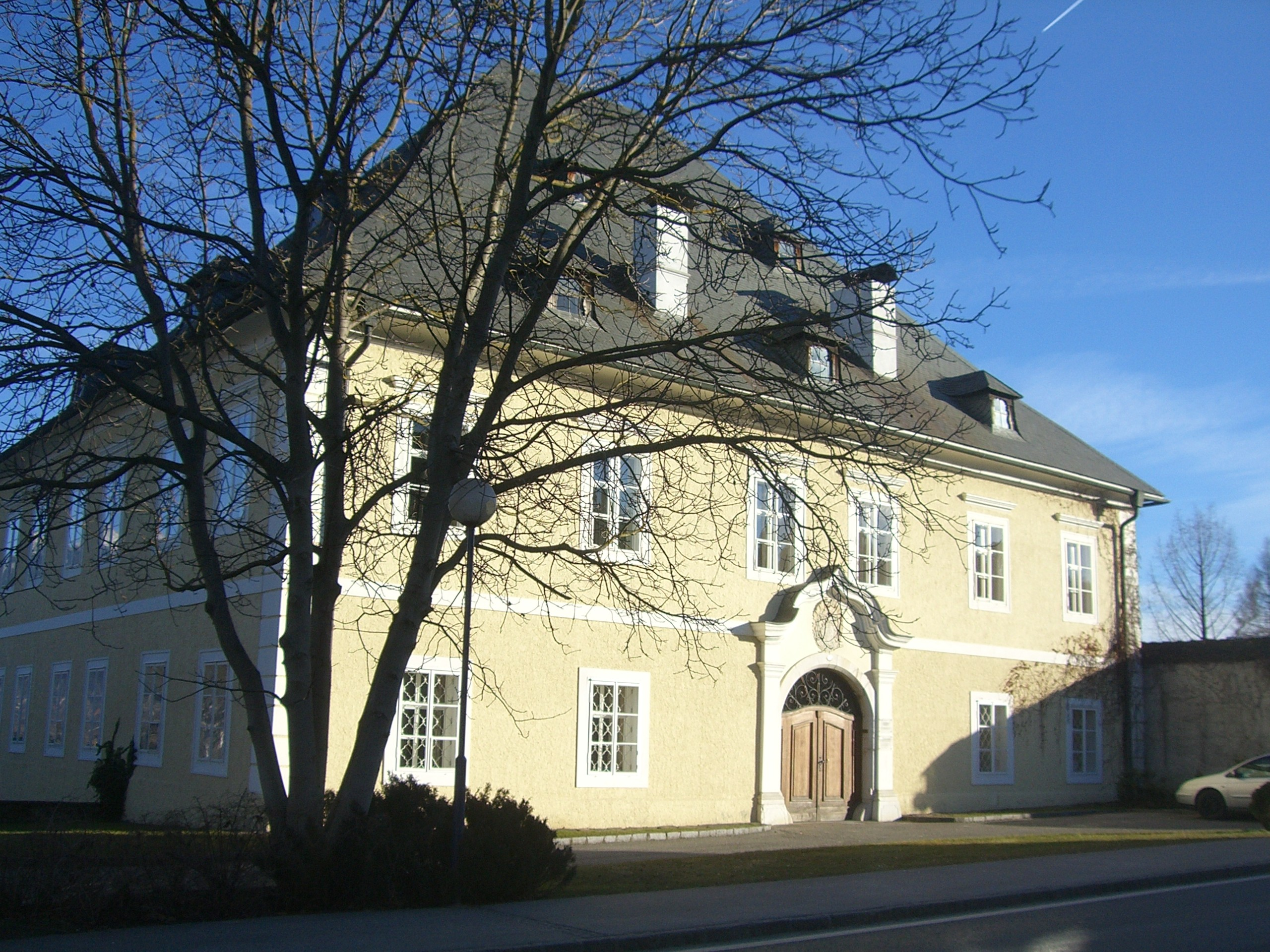 Ehemaliges Salzburger Pfleghaus in St. Andrä